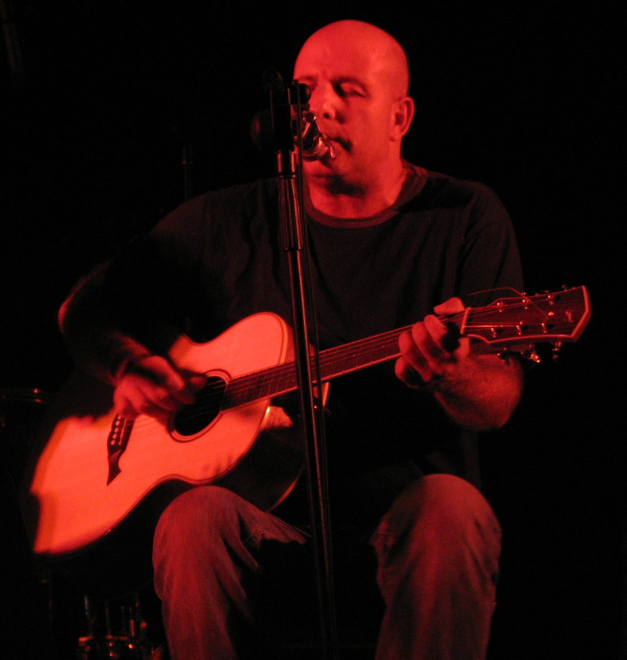 he:עמיר לב בהופעה בhe:כברי, he:5 ביוני he:2006. צולם על ידי חי.